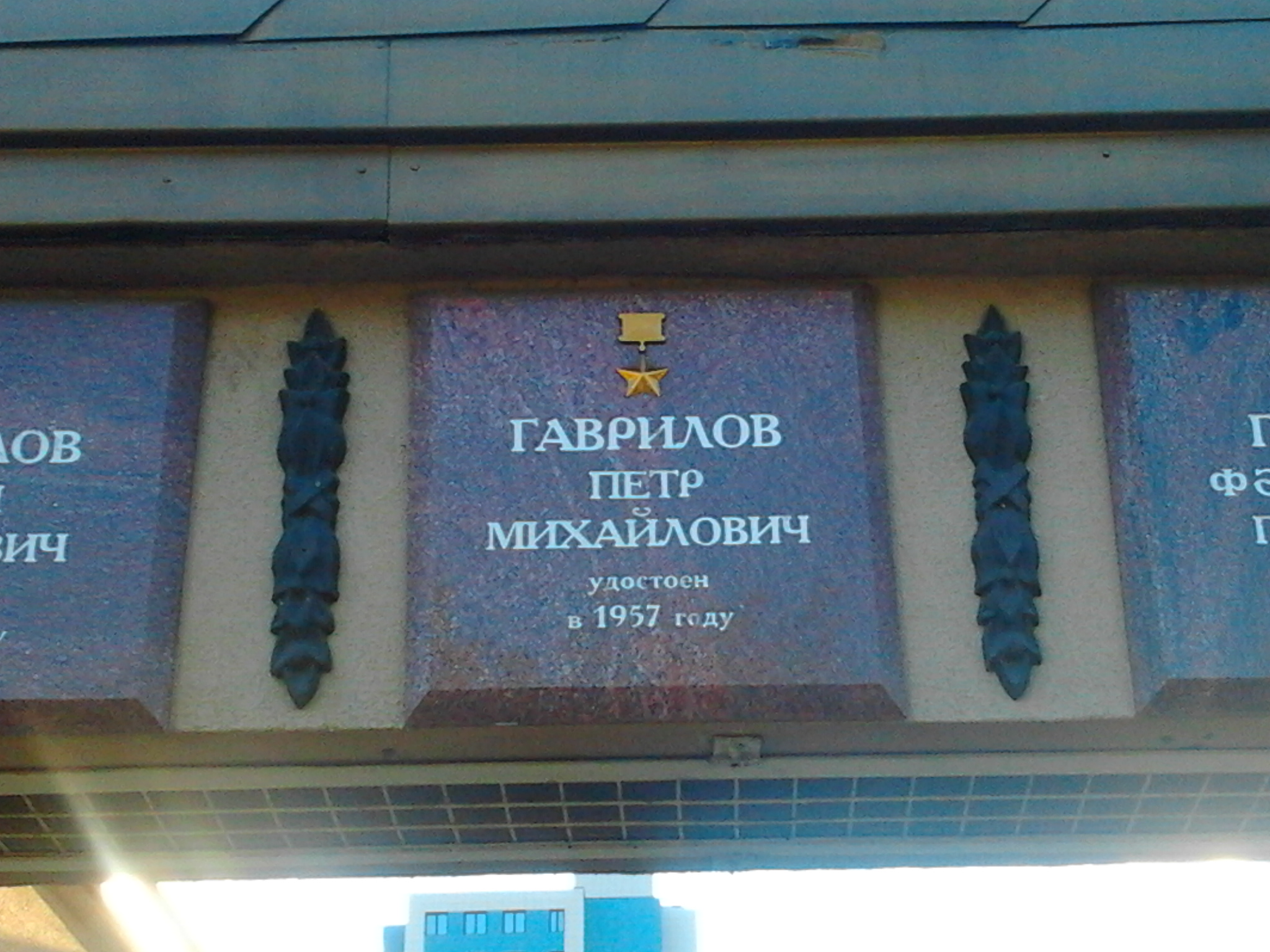 Мемориальная табличка на Пантеоне в Парке Победы г.Казани